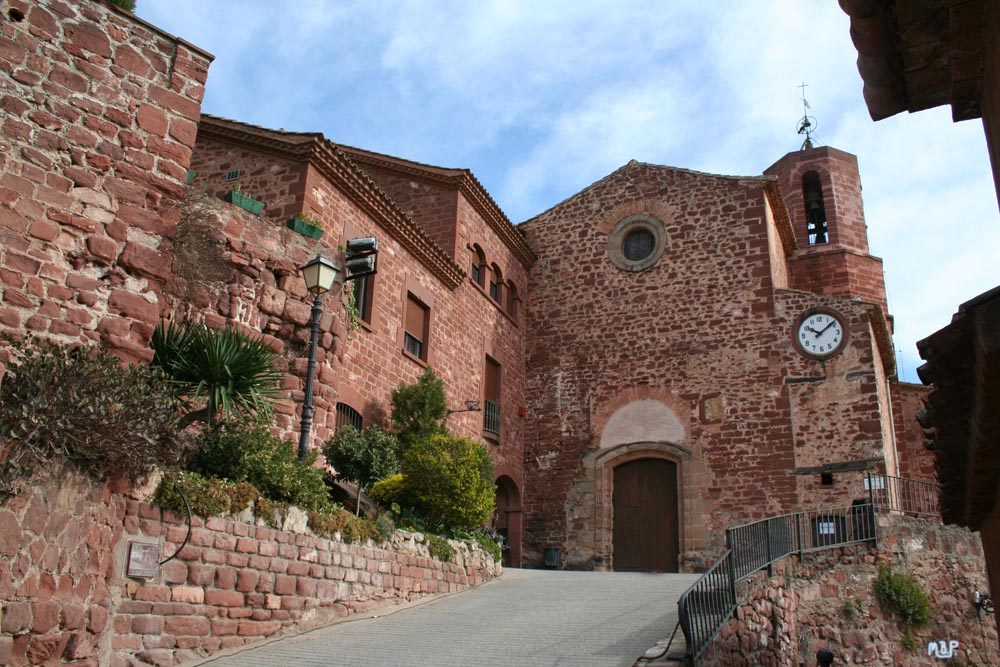 Zona de l'antic castell de Corbera (Baix Llobregat). Al fons, l'església parroquial de Santa Maria, a la seva dreta la rectoria construïda amb les ruïnes del castell, i al costat les restes d'una torre.